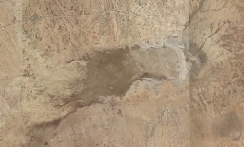 Image satellite de Sebkha Sidi Mansour, Gouvernerat de Gafsa, Tunisie